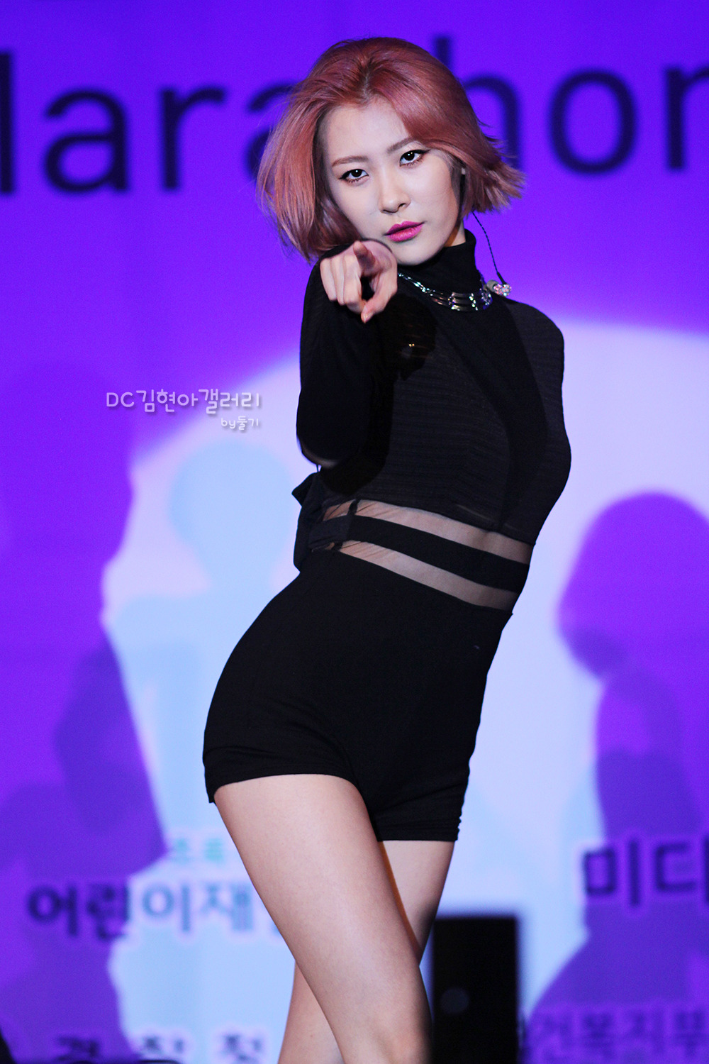 2013년 9월 29일 그린리본마라톤 희망콘서트 에서 선미.